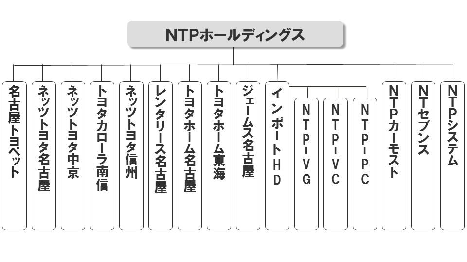 NTPグループの組織図